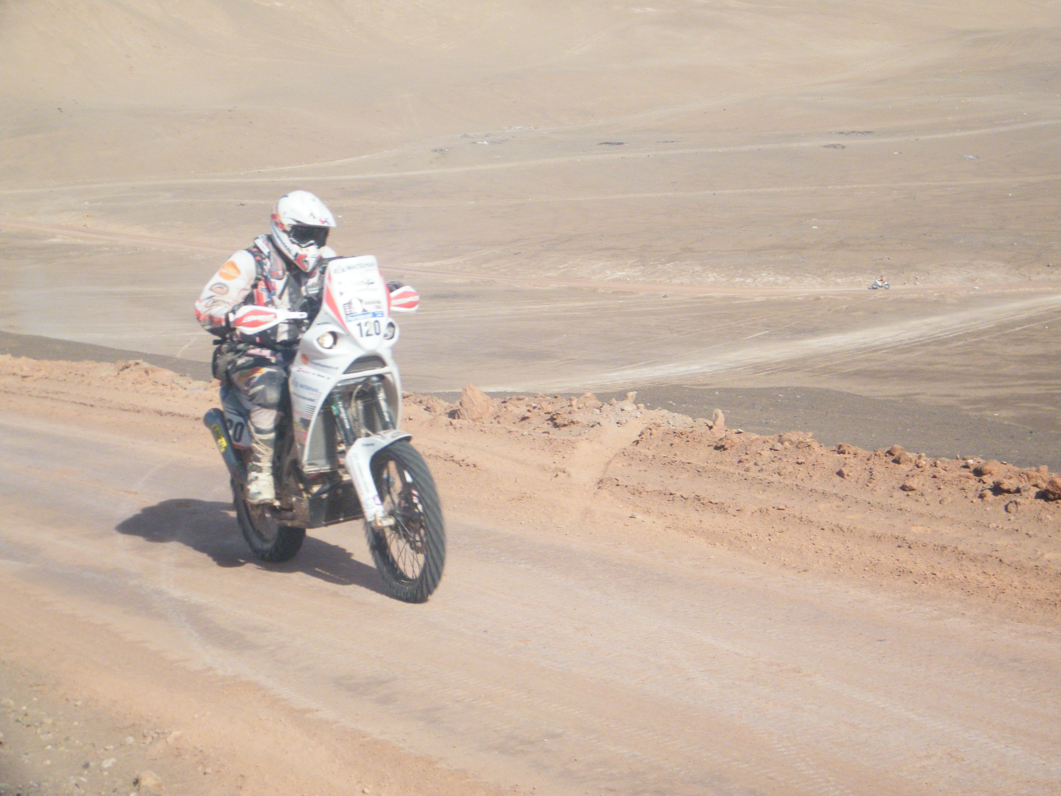 dakar 2011